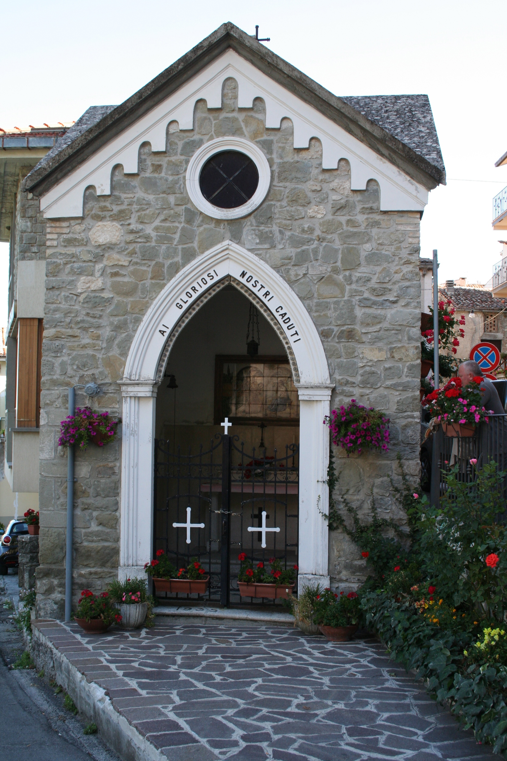 Monumento ai caduti nel borgo di Pietracamela in provincia di Teramo.